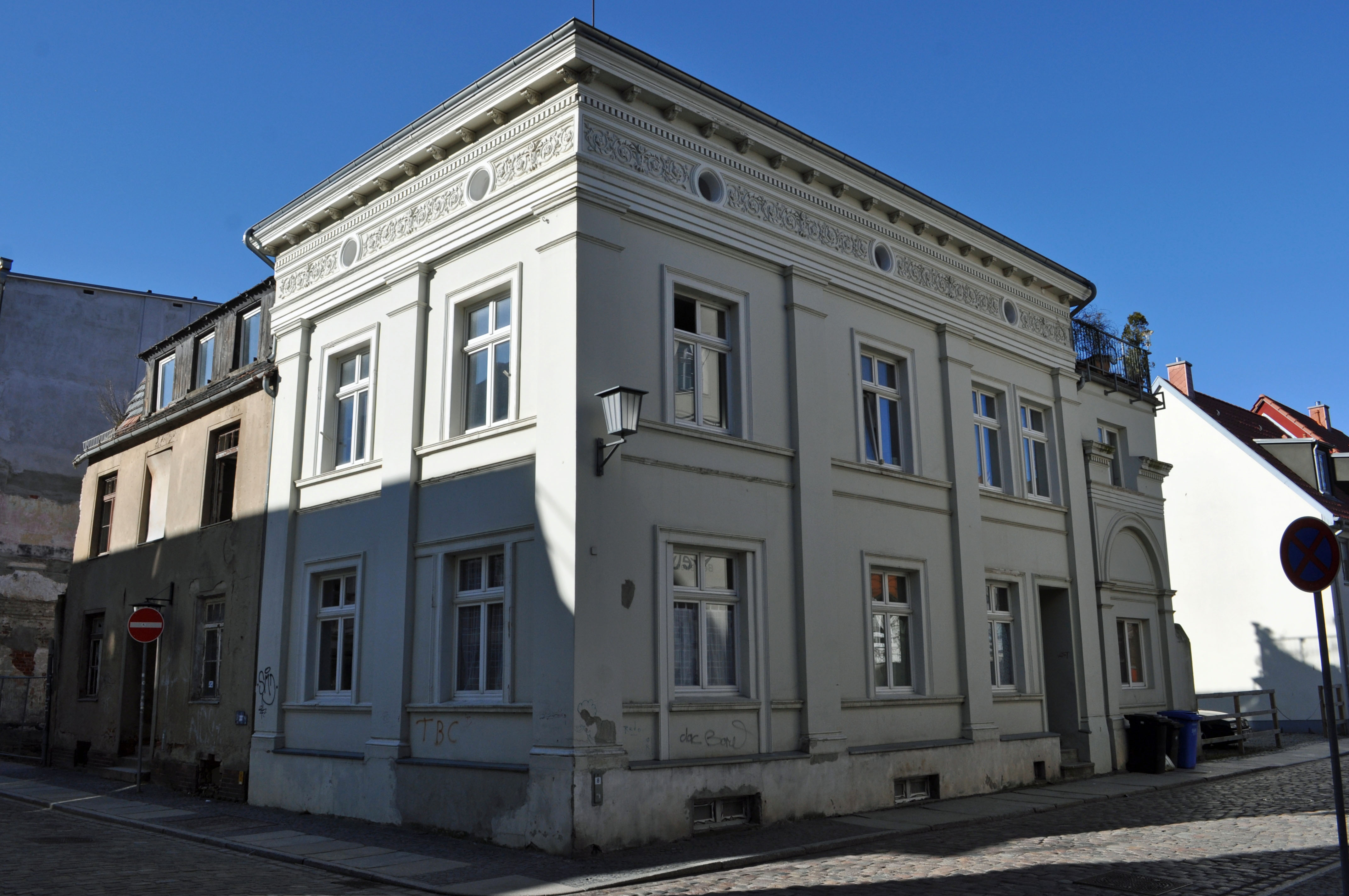 Gebäude bzw. Gebäudedetail in Stralsund. Straße und Hausnummer siehe Dateiname.